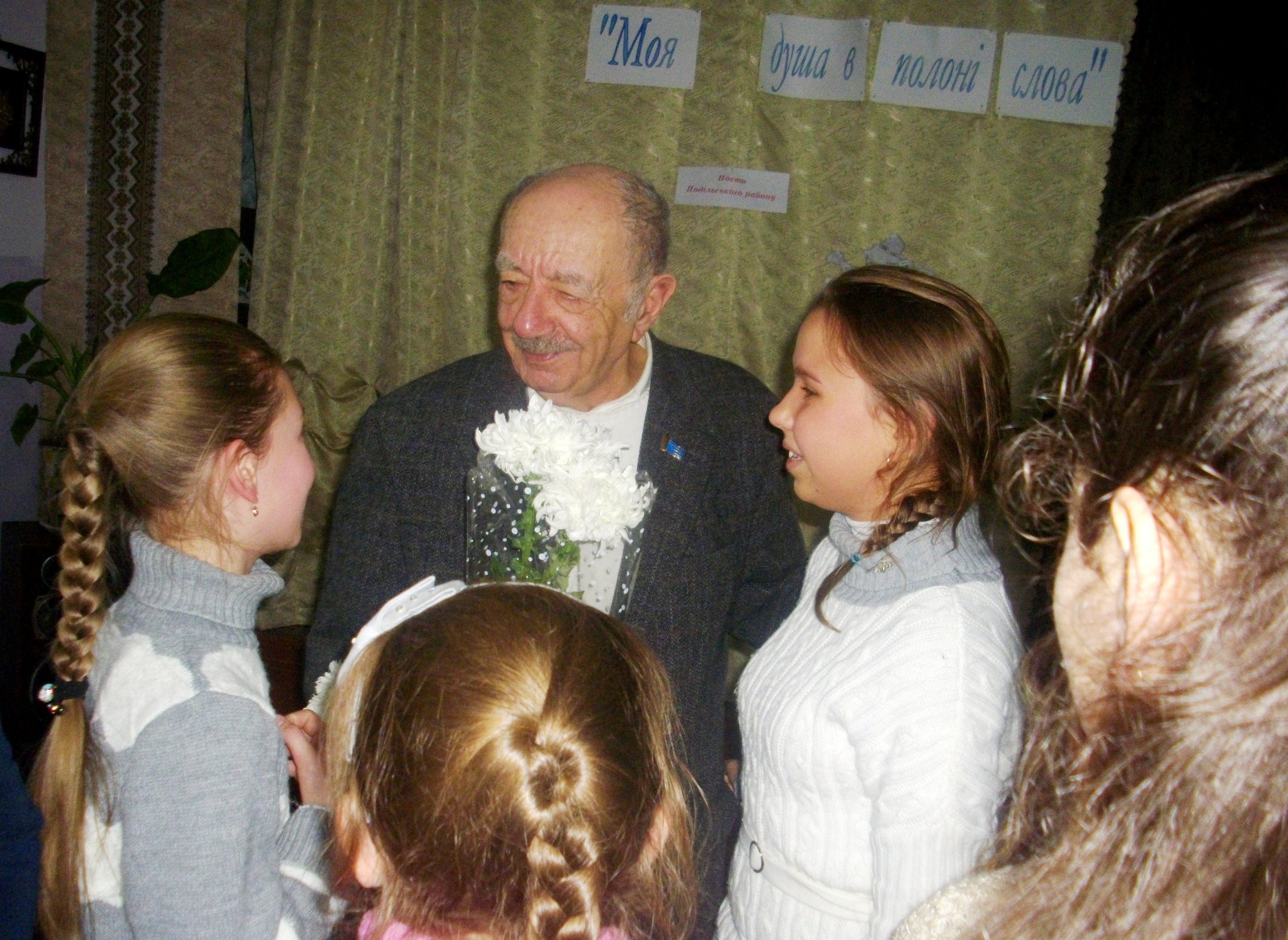 Зустріч Олександра Корембліта з талановитими учнями села Новоселівка Подільського району Одеської області під час районної культурно-освітньої акції "Жива книга"